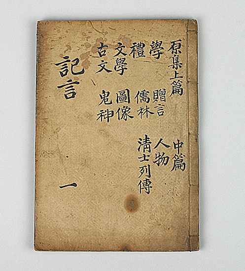 미수기언